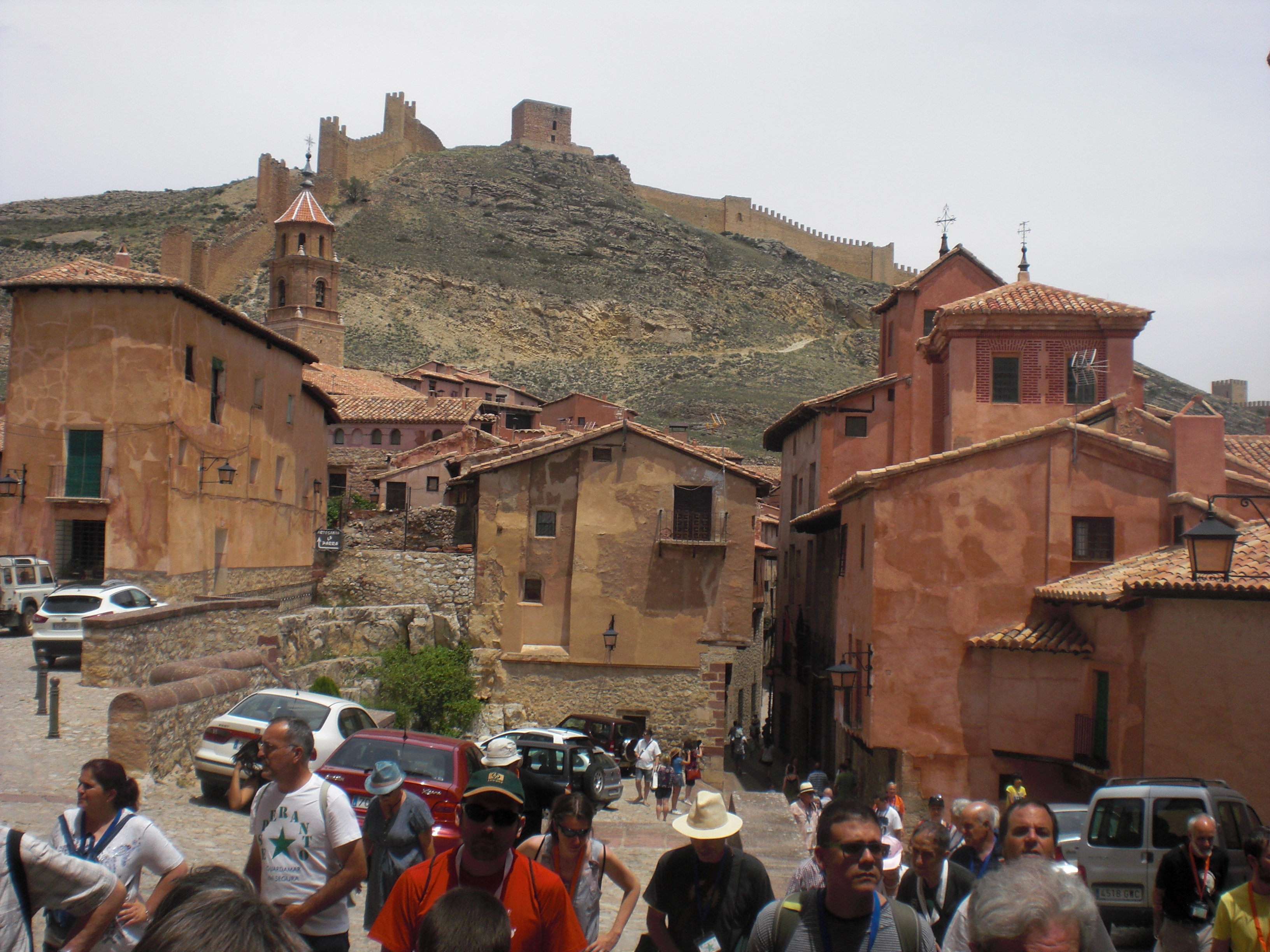 esperantistoj en Albarracín